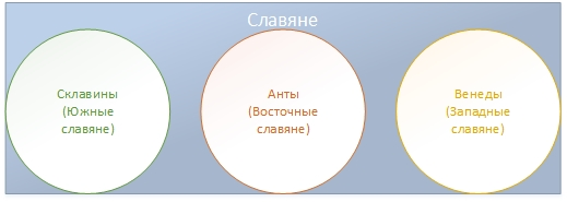 (Первая гипотеза) Схема взаимоотношений между венедами, антами и склавенами. И склавены, и венеды, и анты являются славянами.